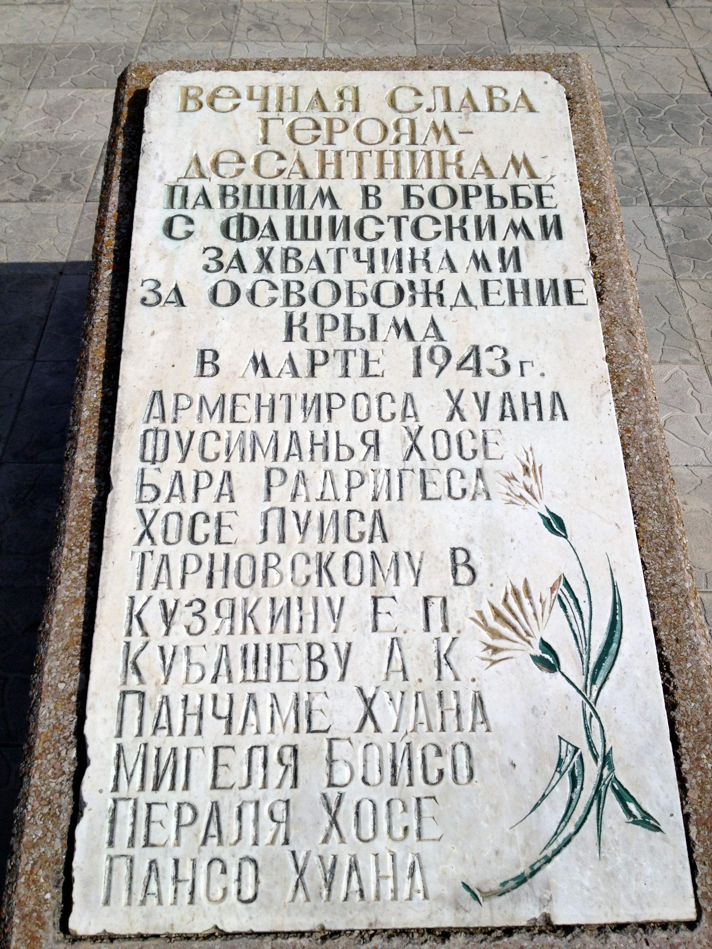 Monument on està enterrat